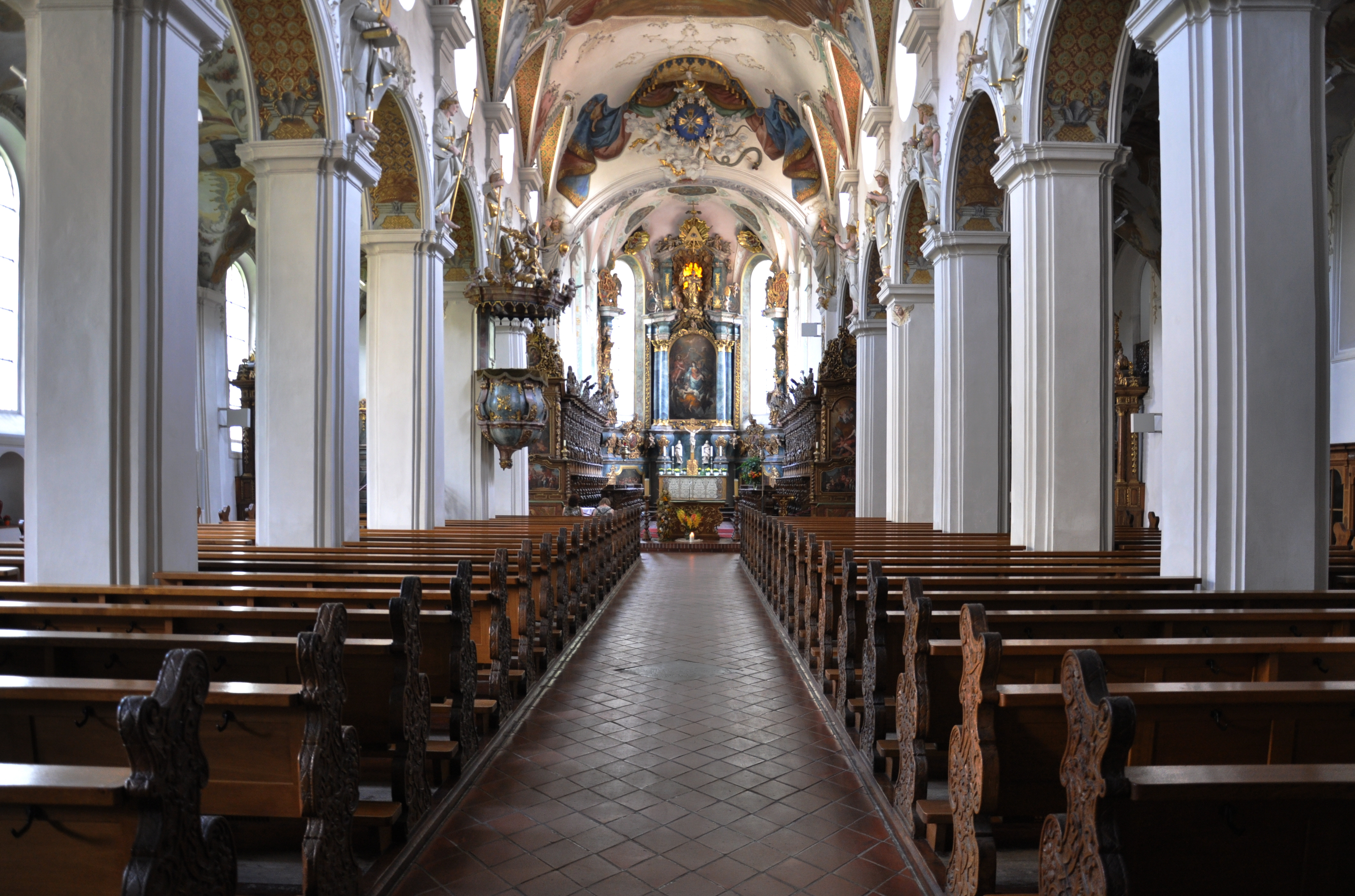 Bad Schussenried, Pfarrkirche St. Magnus (ehemalige Klosterkirche) Blick zum Chor